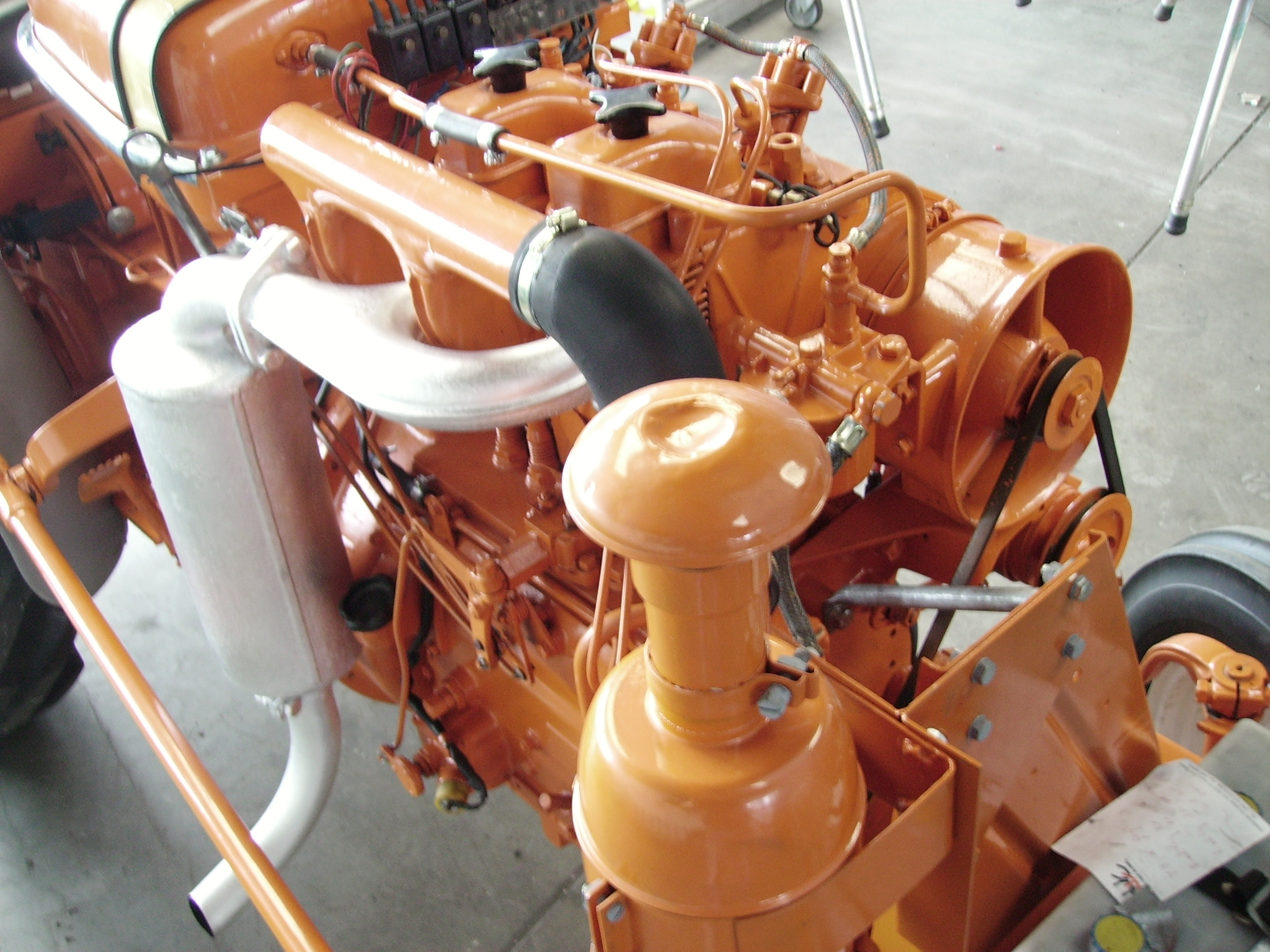 Renault V72, MWM AKD112Z moteur